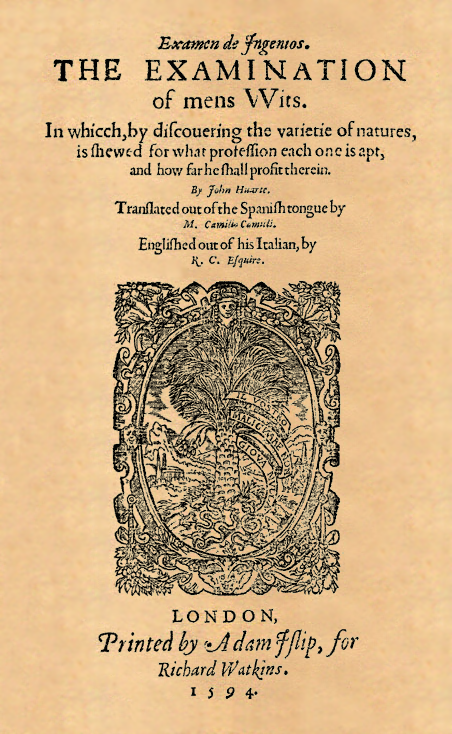 Portada del libro "The examination of mens wits", publicado por Juan Huarte de San Juan en Londres en 1594.